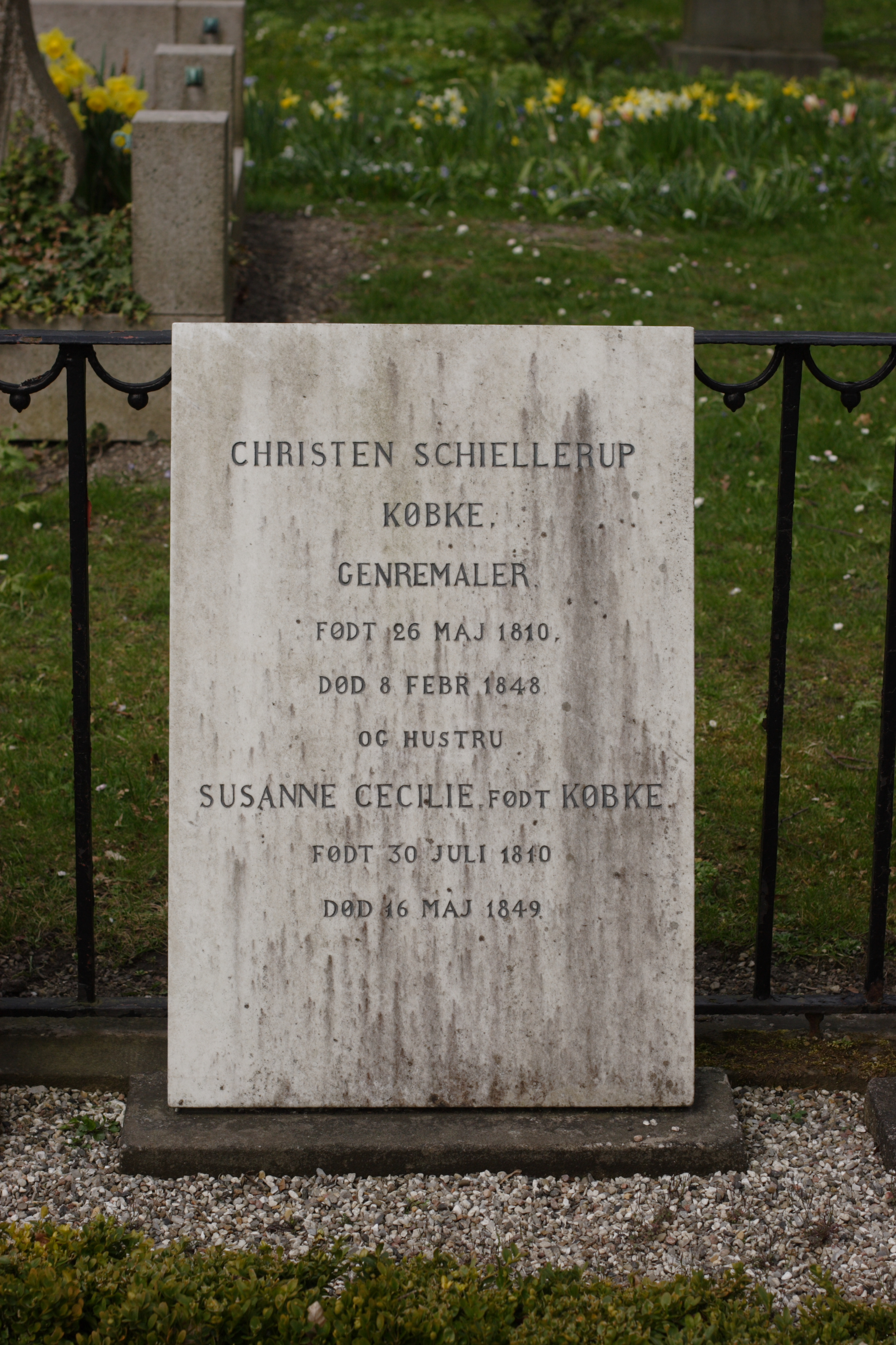 Christen Købkes gravsten